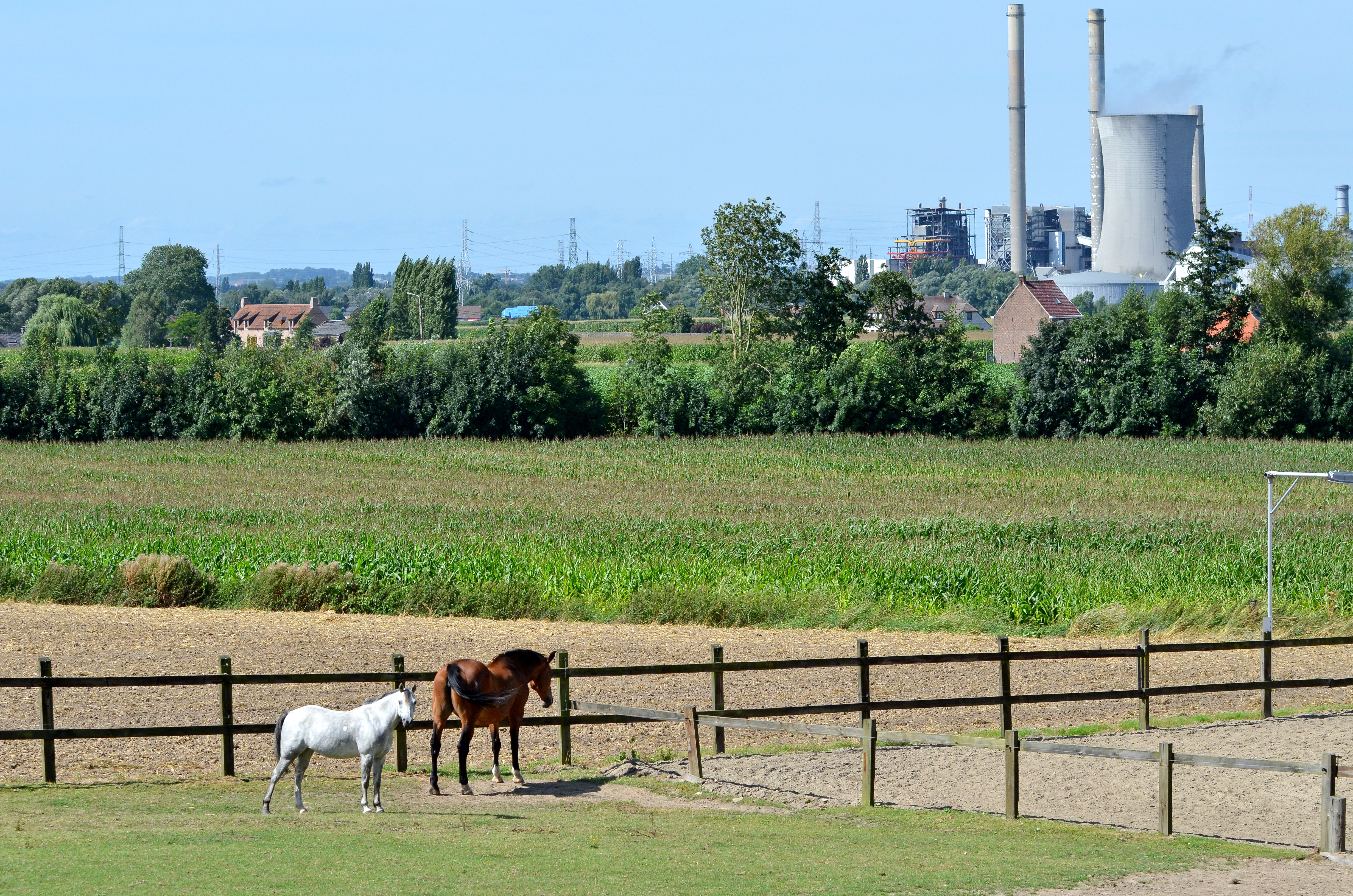 Landschap in Kluisbergen